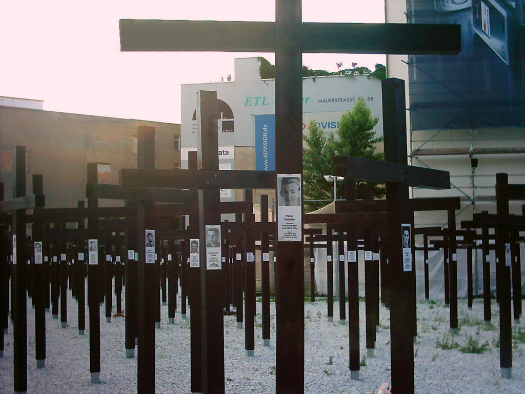 Fechter Mauerkreuz am Checkpoint Charlie vom 19.06.2005 Dateistatus: GNU FDL